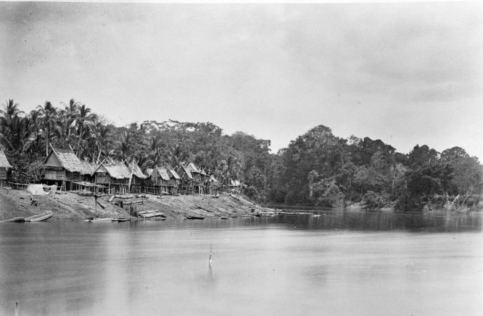 Foto. Deze foto is gemaakt tijdens de Sumatra Expeditie van 1877-1879. Landschappen uit de afdeeling Rawas.. De Batang Rawas bij Biengien Telok, district Rawas, Sumatra